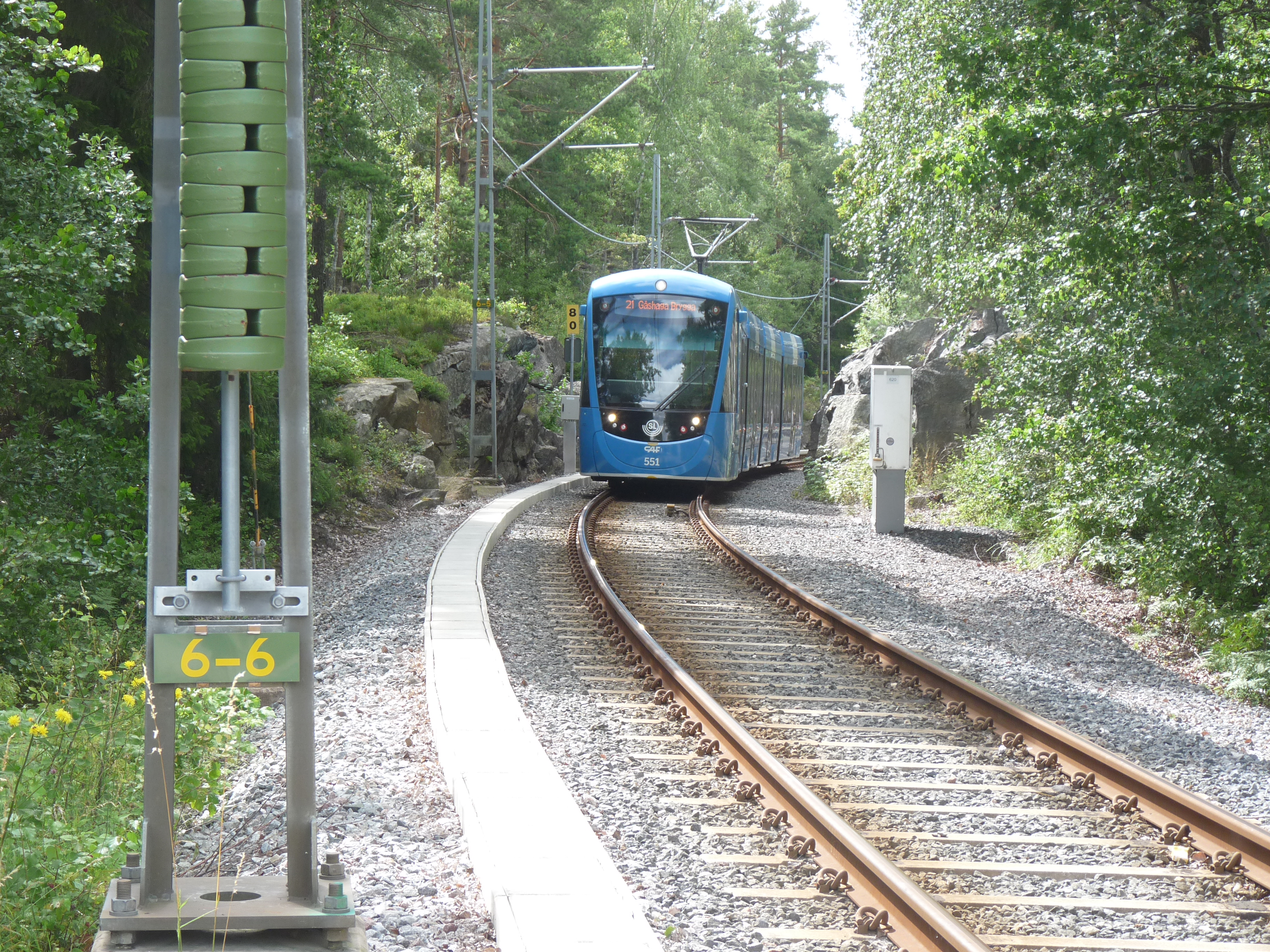 Binnenkomende tram bij Högberga tramstop